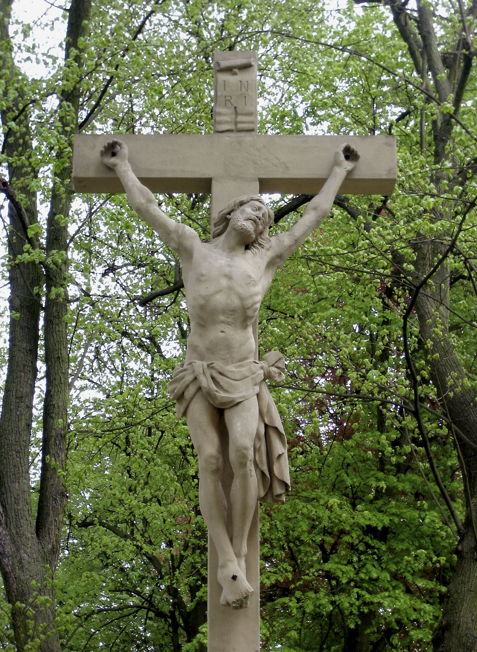 Dieses Kreuz, das Johann Adam Ney 1842 geschaffen hat, steht in Werne